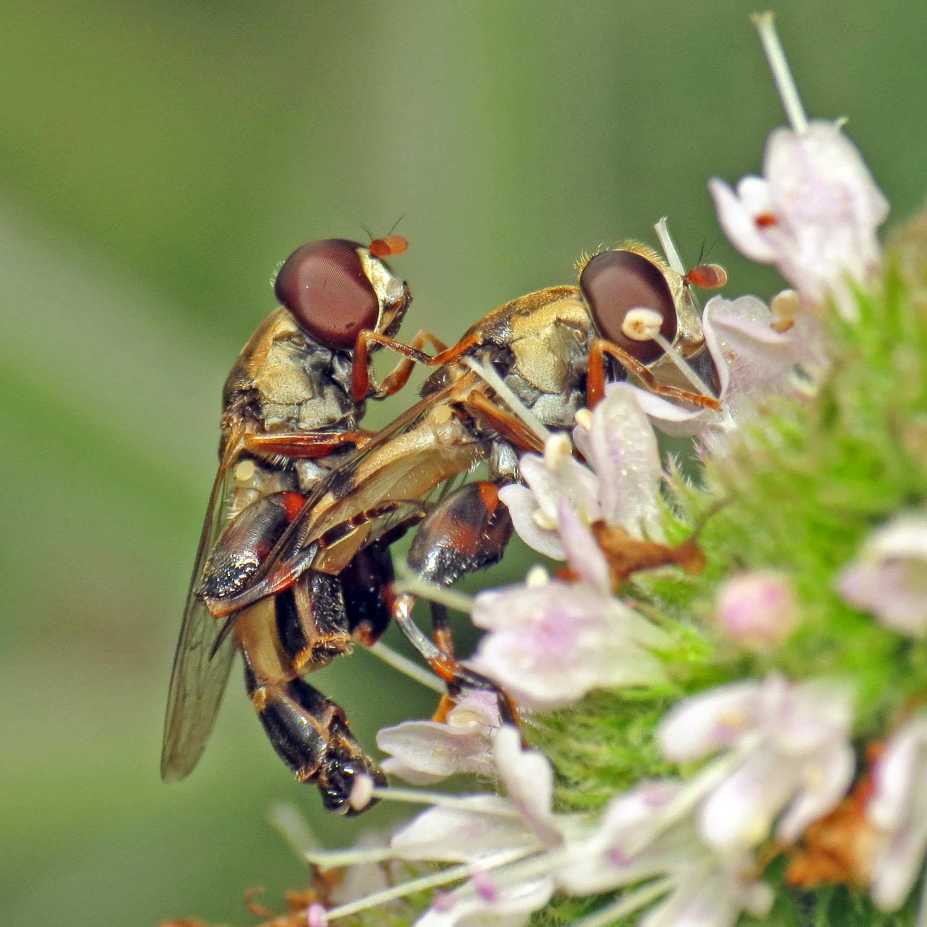 Syritta pipiens couple